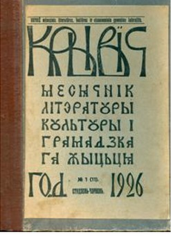 Вокладка часопіса «Крывіч». №1, 1926.